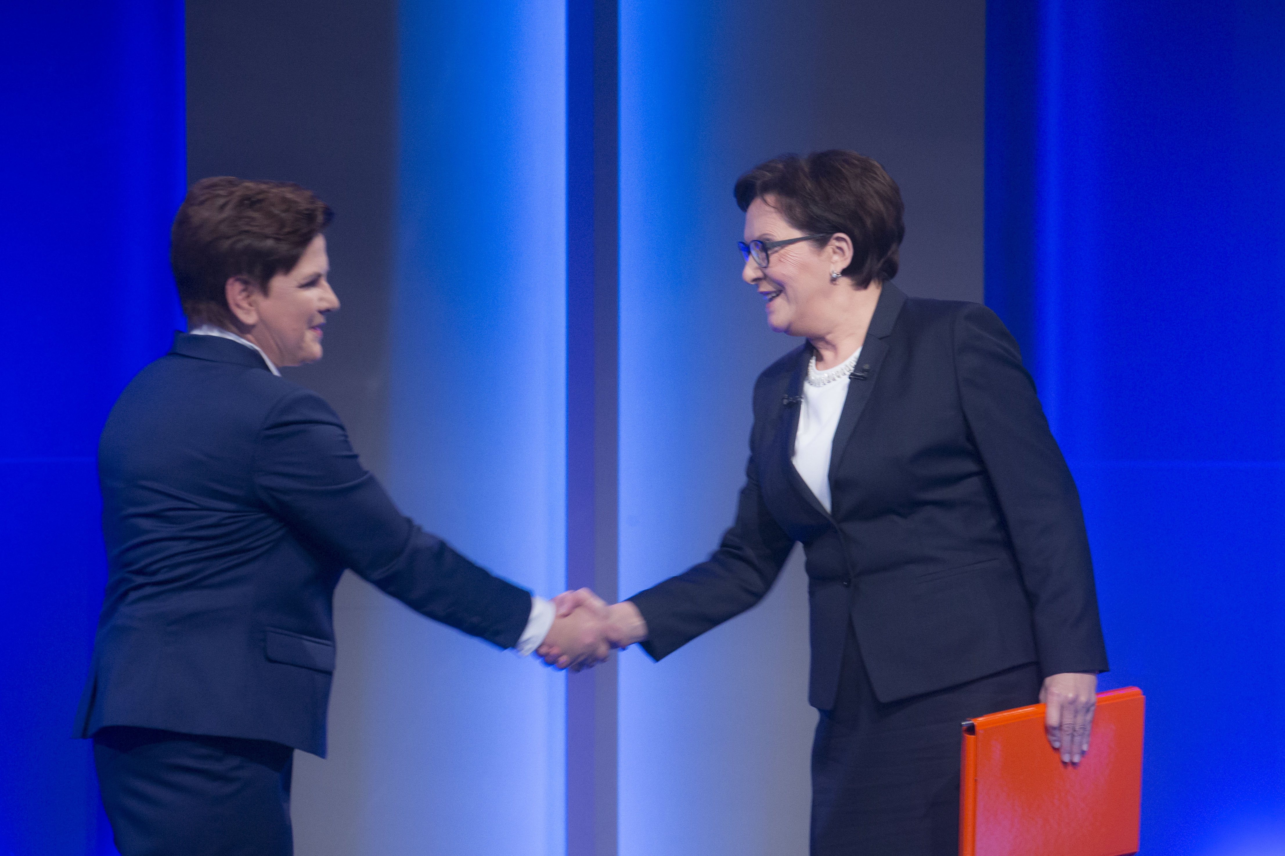 "Rozmowa o Polsce" - debata Premier Ewy Kopacz z Beatą Szydło, 19.10.2015